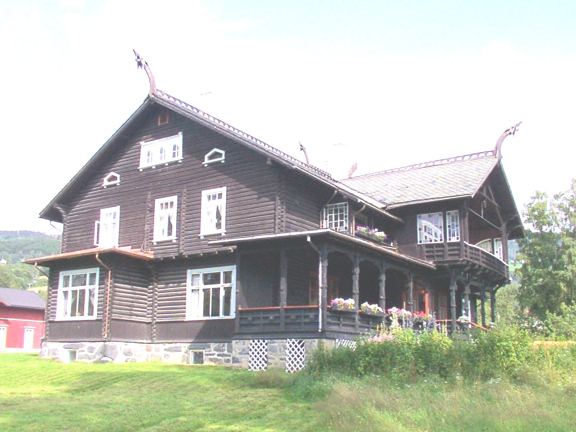 Kornhaug in Gausdal